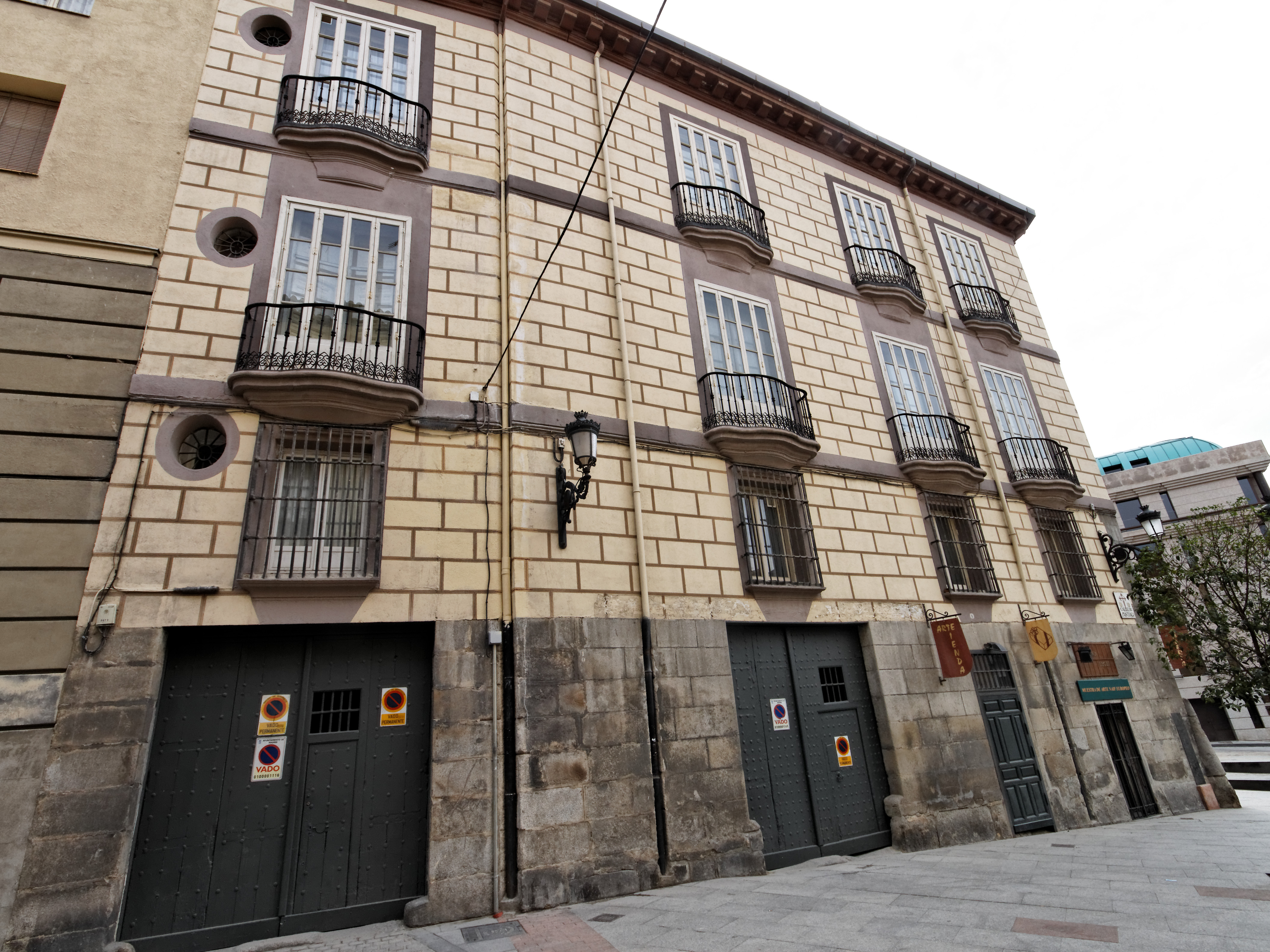 Casa-palacio de Domingo Trespalacios, obra del arquitecto Andrés Díaz Carnicero, fechada en 1768. Madrid.